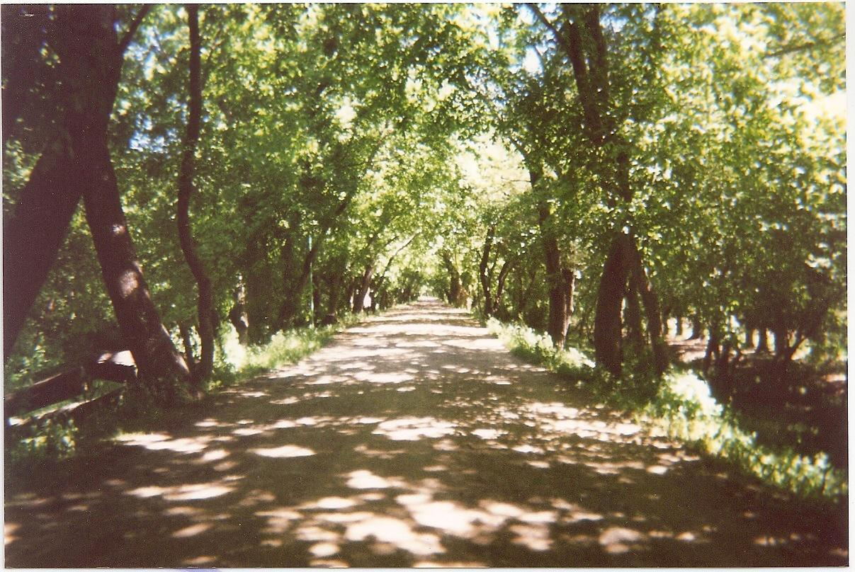 Traza donde se asentaban las vias ferroviarias del ferrocarril mitre que unian Dique Lujan con el F.C.C.A.